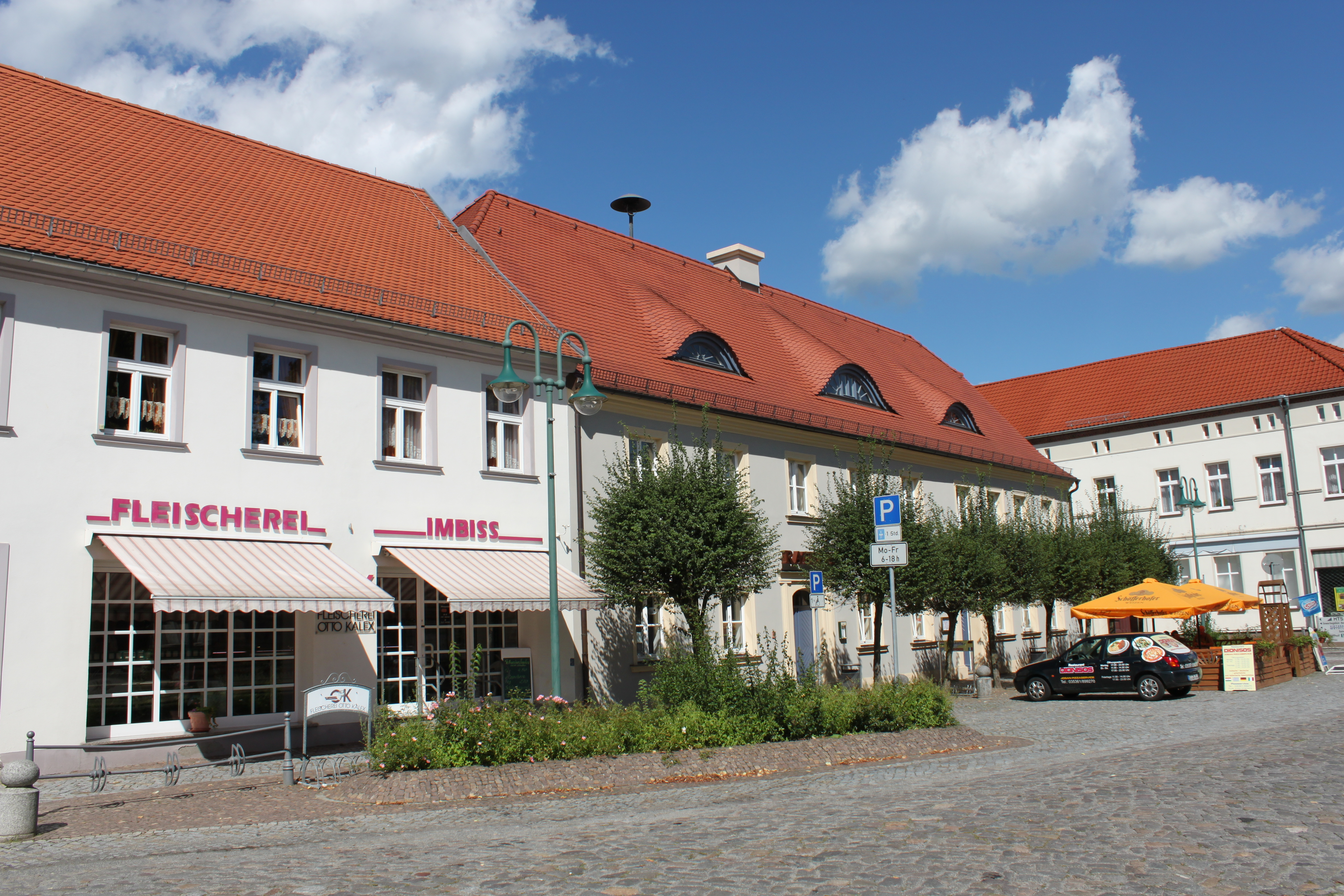 Markt 5 (altes Rathaus) in Schlieben